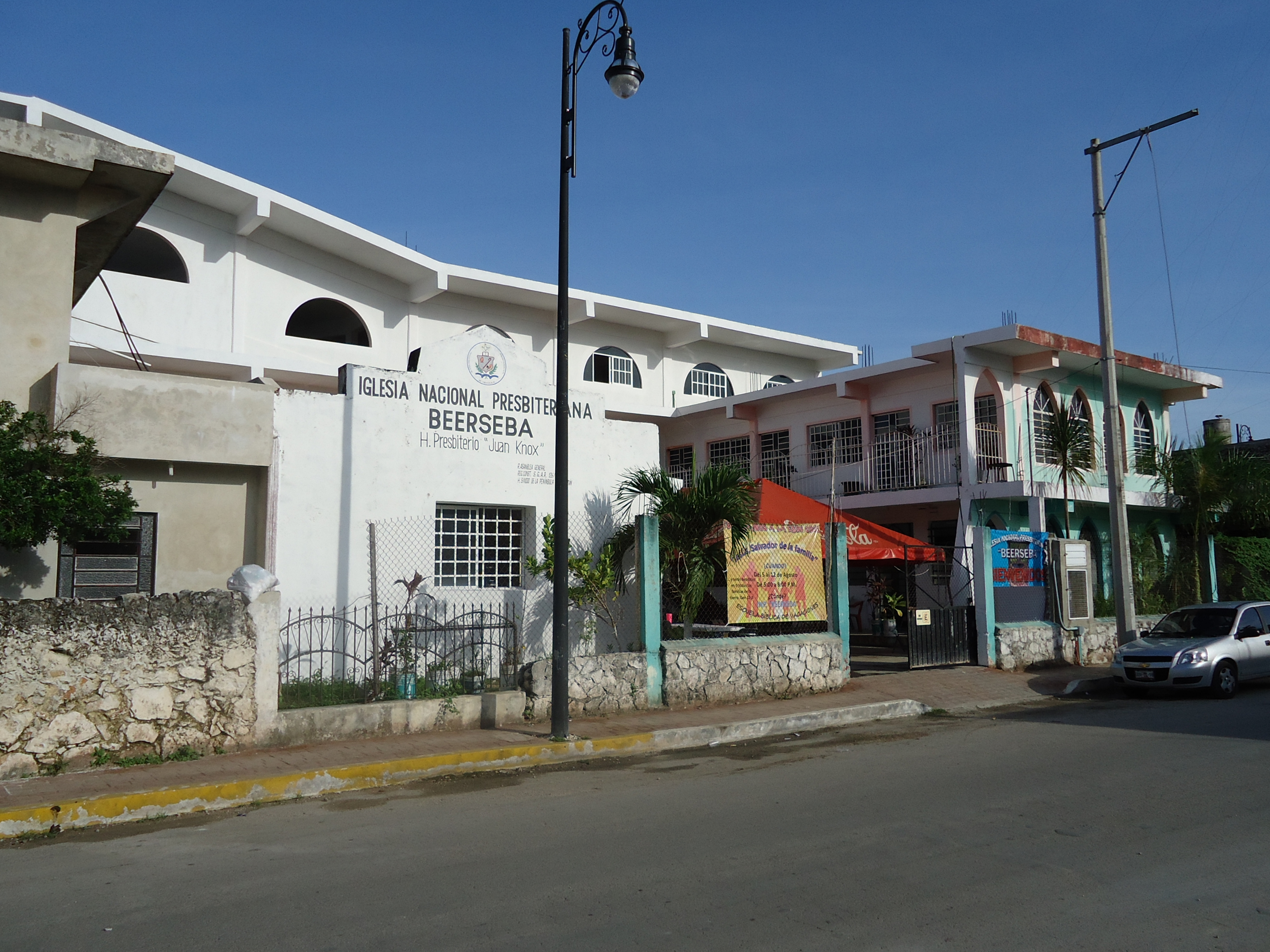 Iglesia Nacional Presbiteriana de México Beerseba Calle 63 x 64 y 66, Felipe Carrillo Puerto, Quintana Roo